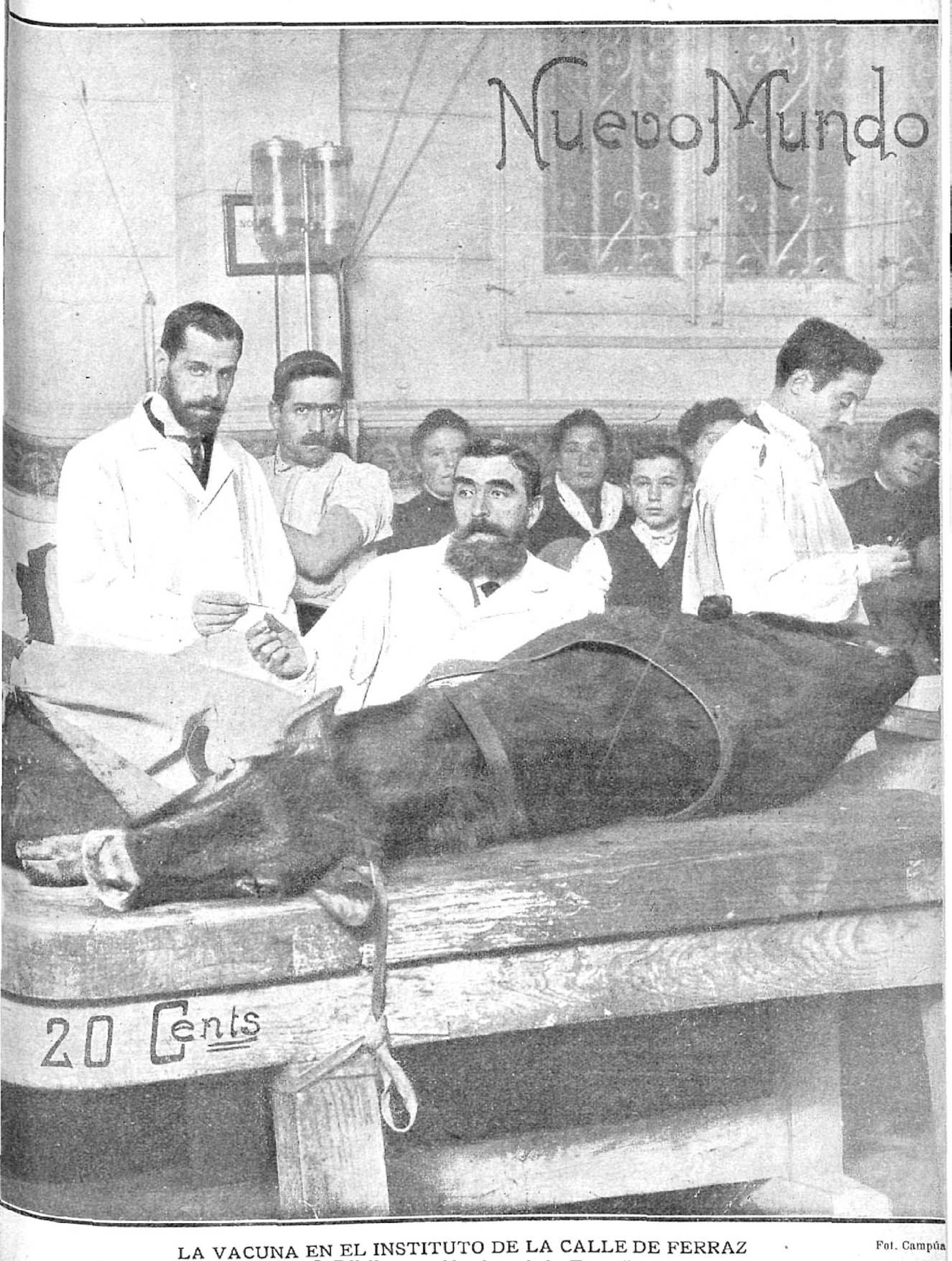 La vacuna en el instituto de la calle de Ferraz.